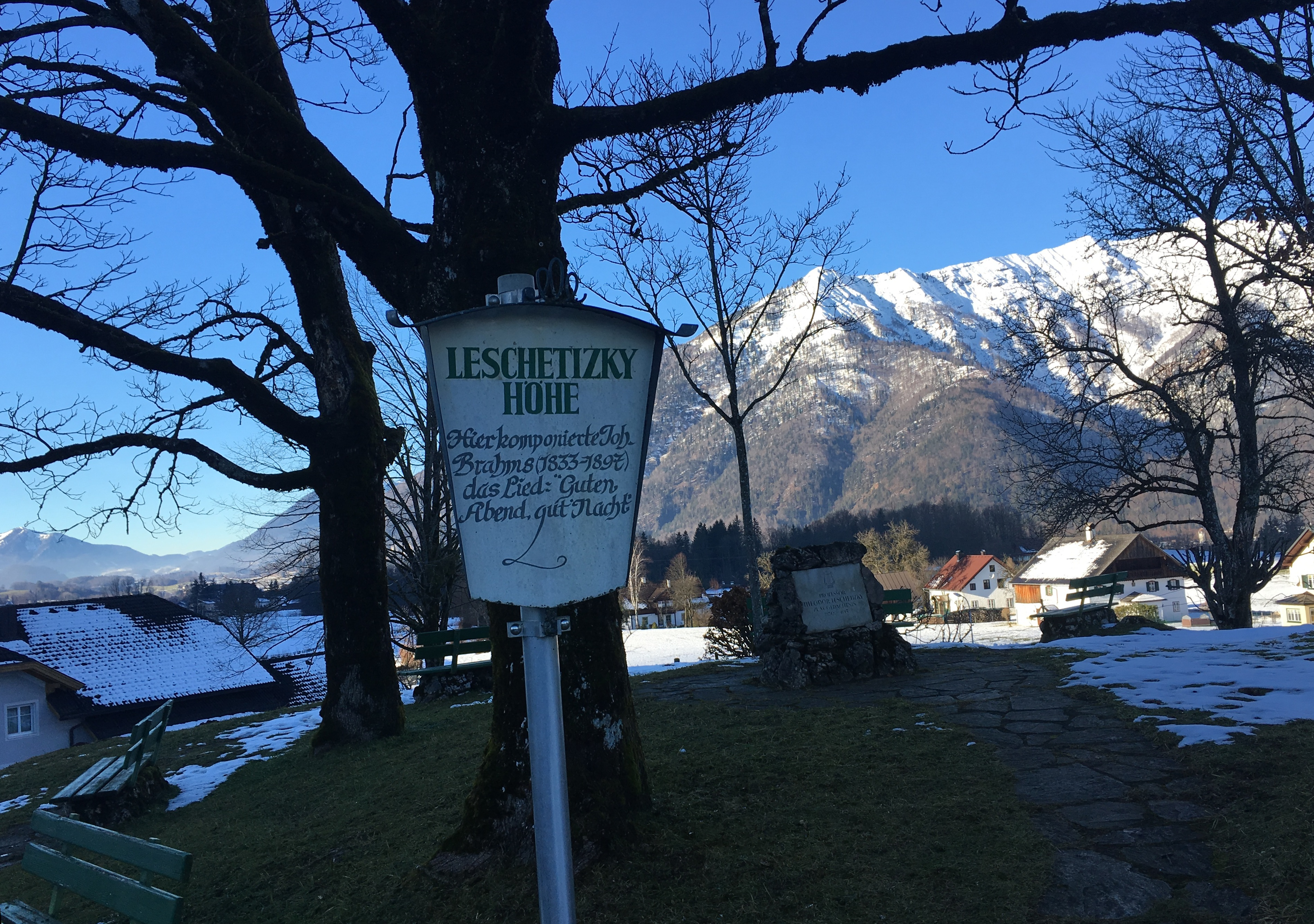 Leschetizky-Höhe in Bad Ischl mit Denkmal für Theodor Leschetizky (1830-1915). Hier komponierte Johannes Brahms (1833-1897) das Lied „Guten Abend, gut’ Nacht“.